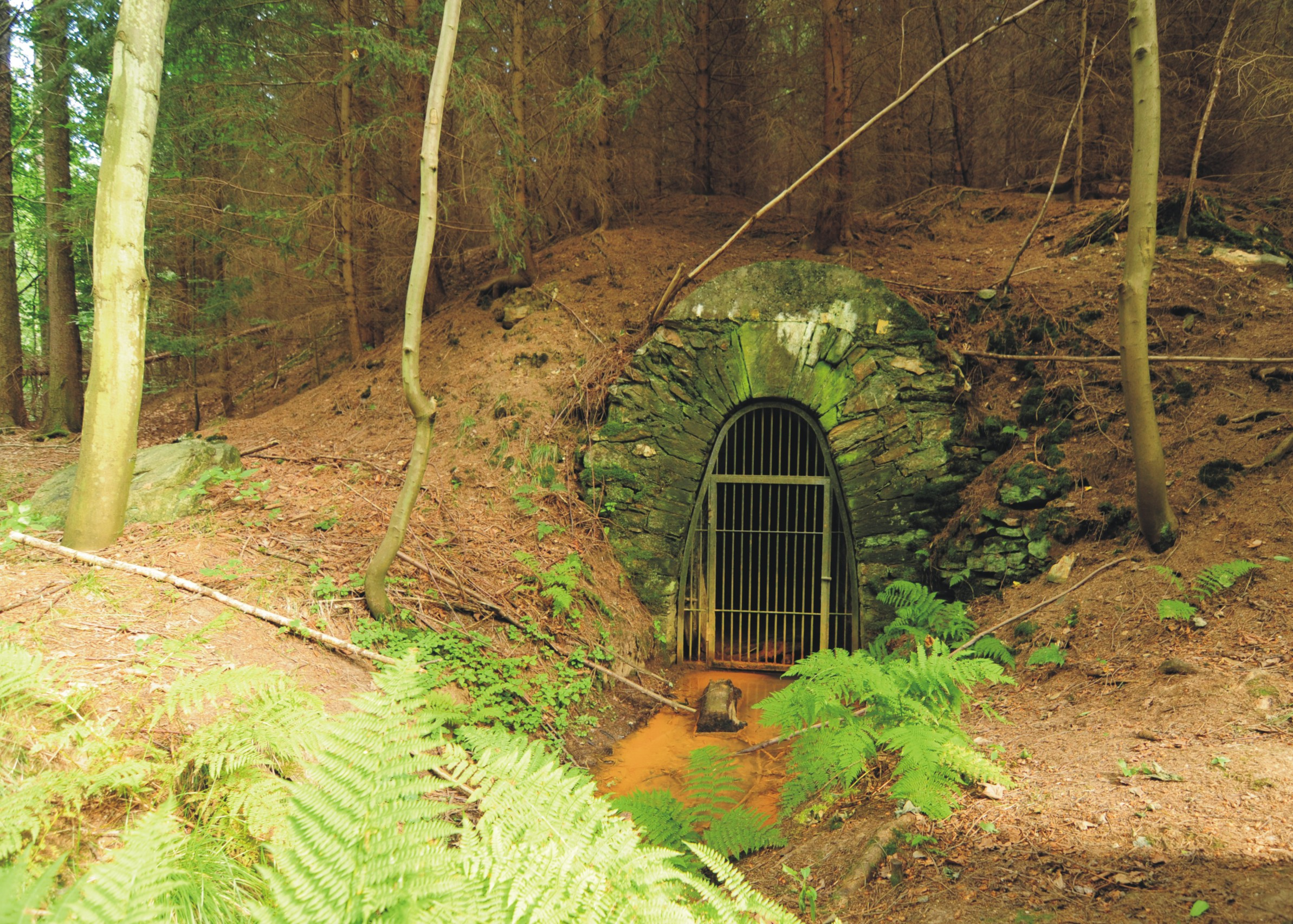 Mundloch des Adolphstollns im Zellwald (Sachsen, Deutschland)